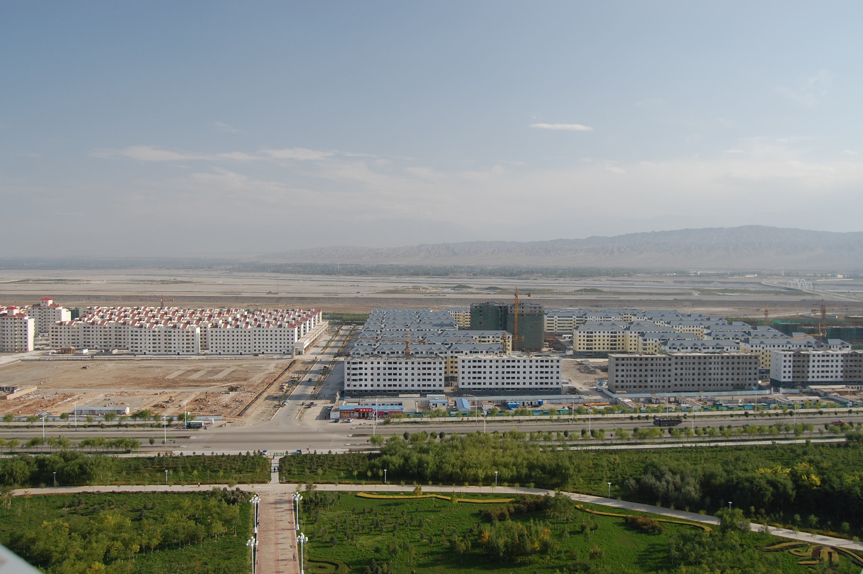 Neubaugebiete in Jiayuguan, Provinz Gansu, China